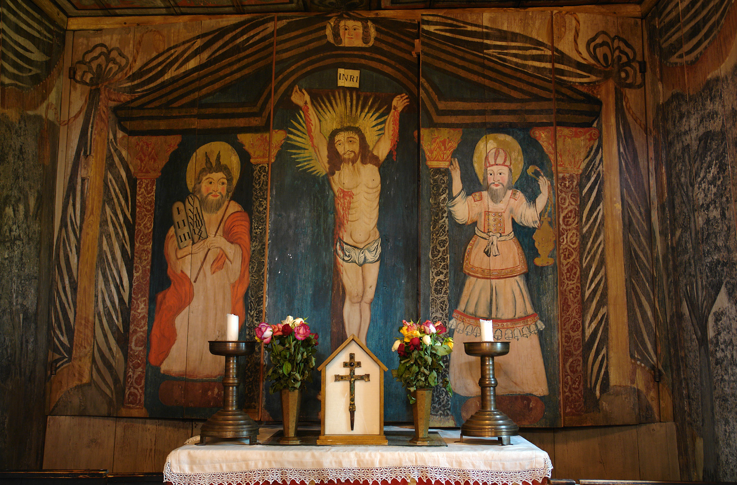 Stabkirche von Hedared: Das Altarbild aus dem 18. Jh. Links Moses, Jesu, Aron.